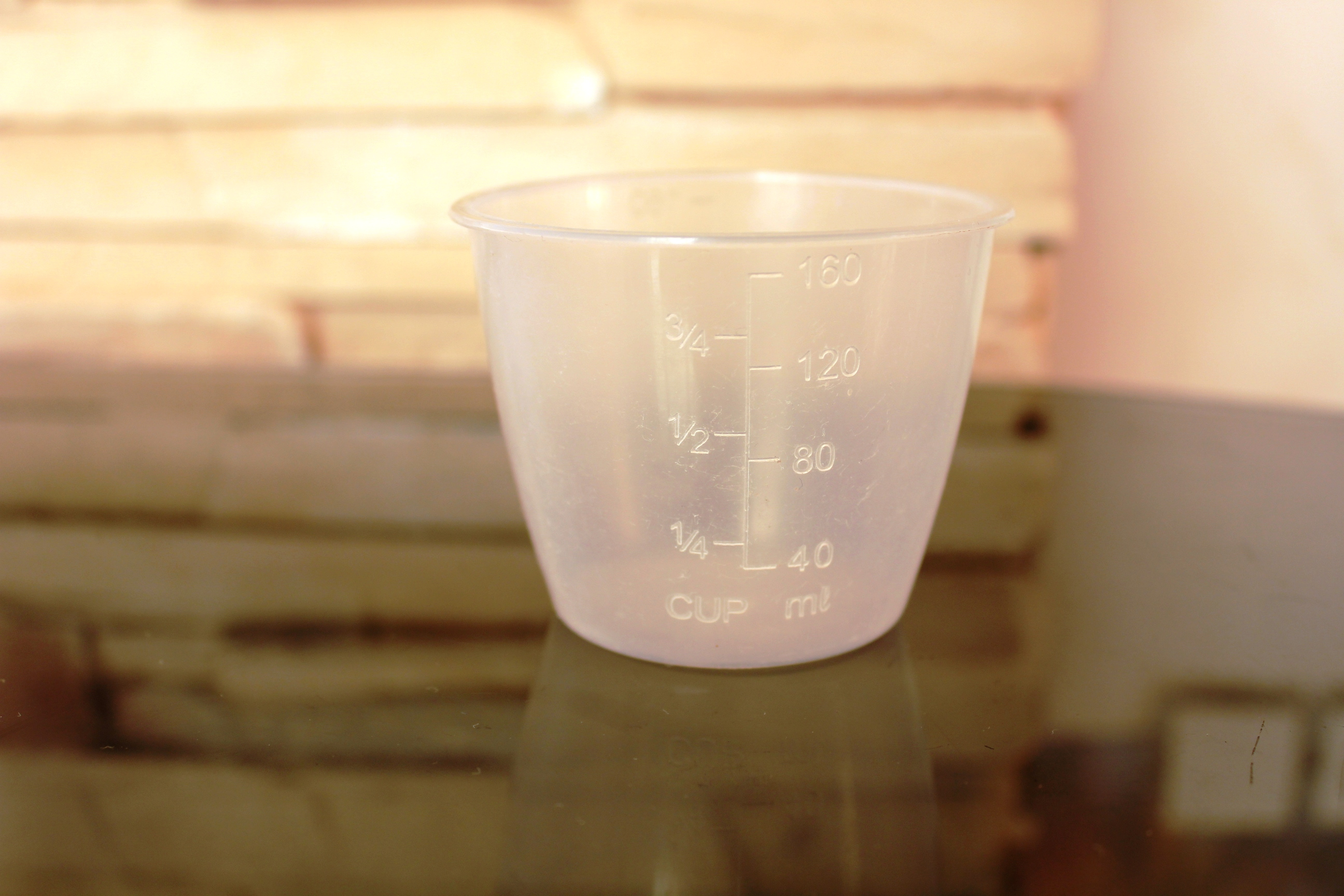 Мерный стакан пластиковый